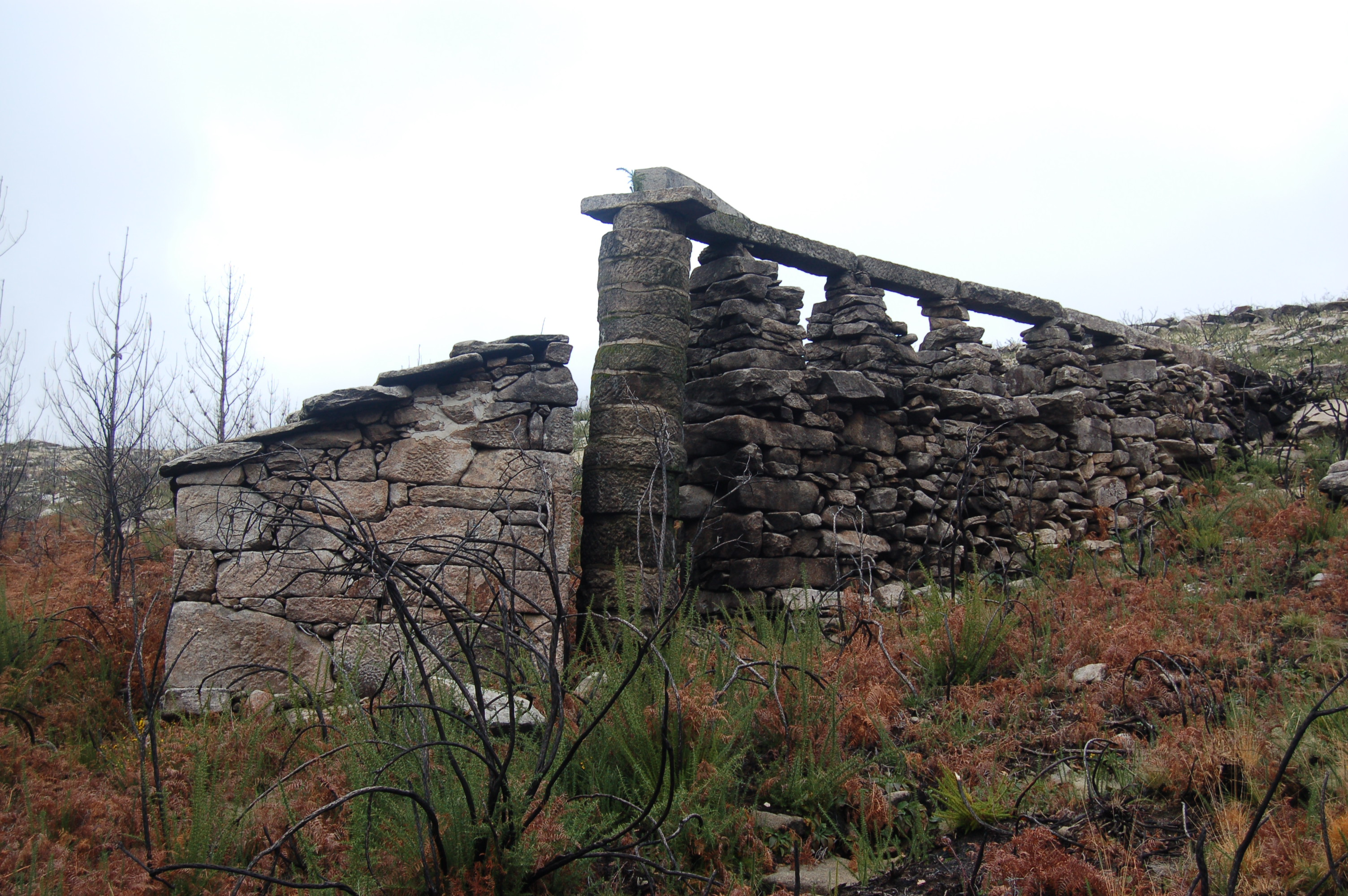 Muíño con acueduto no rego de Chan das Latas, en Carballedo (Cerdedo-Cotobade)